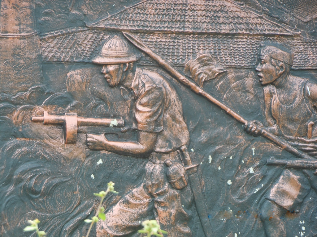 Confrontatie Nederlandse KNIL en Indonesische TRI monument bij een Militaire Begraafplaats in Palembang. Foto 2013 M.B. ter Borg (Detail TRI vechters)